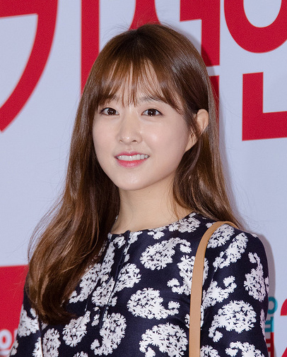 2016년 5월 11일 엽기적인 그녀2 VIP 시사회에서의 박보영.